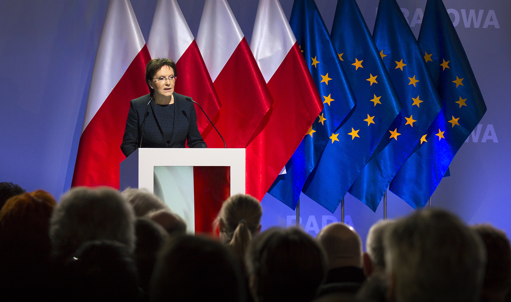 Rada Krajowa Platformy Obywatelskiej RP, Warszawa (6.02.2015)